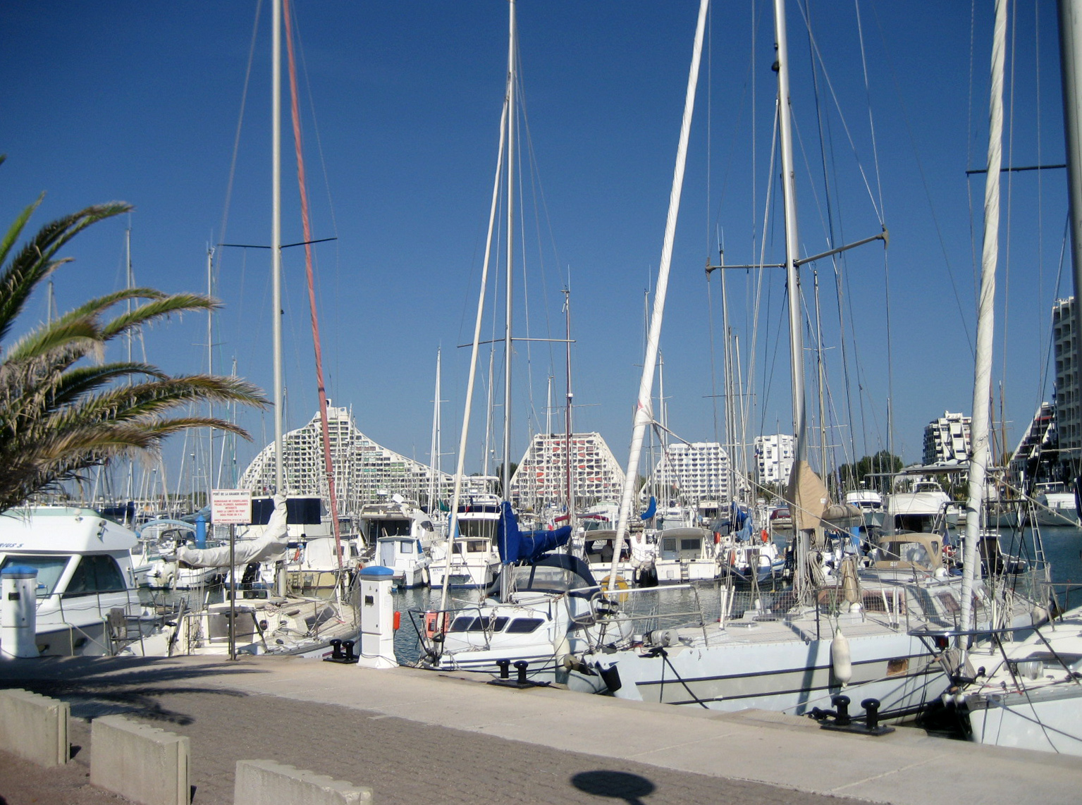 Le port de La Grande Motte avec le batiment La grande Pyramide au fond. (Département de l'Hérault, France)